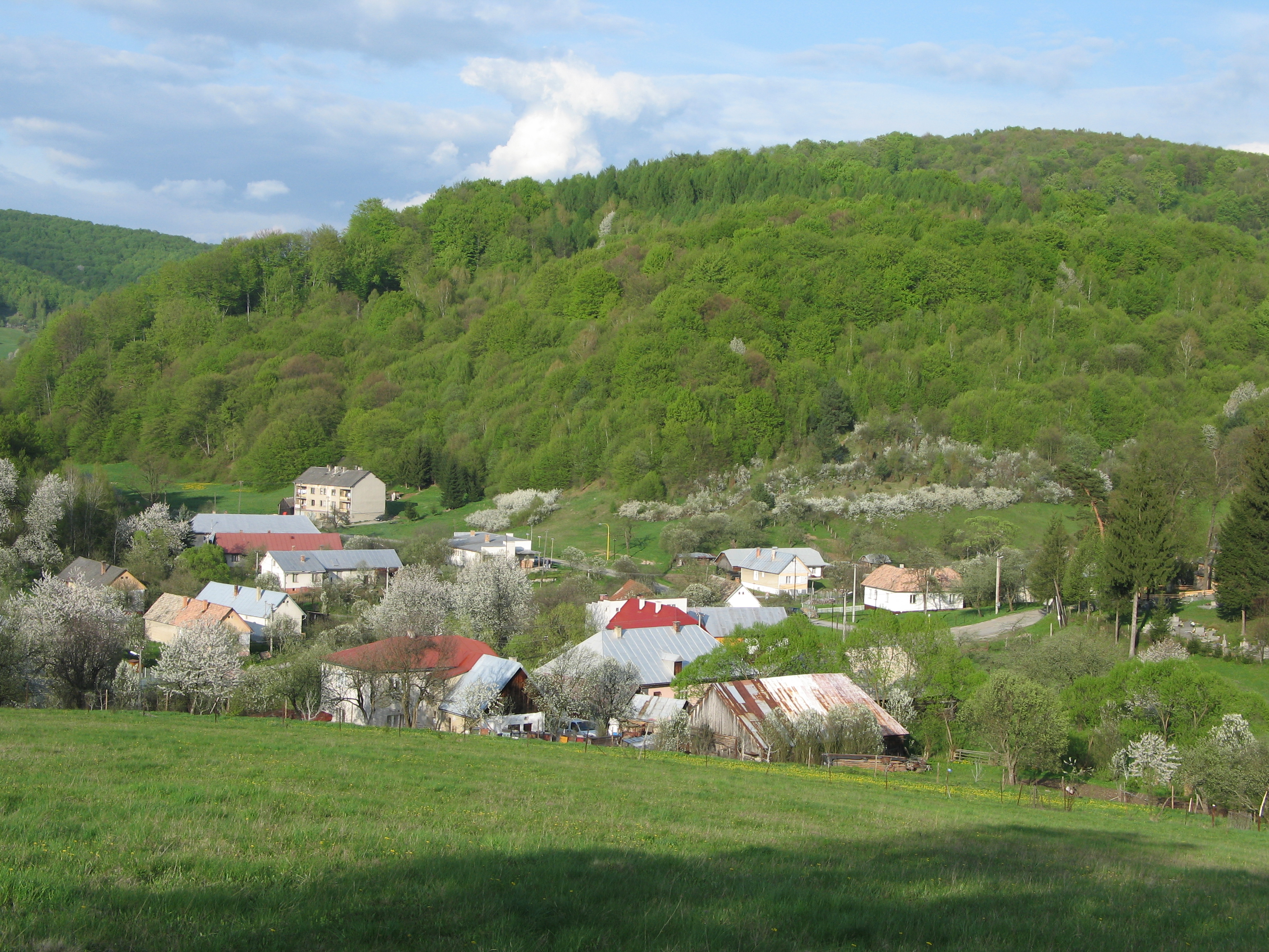 Májový Bodružal. Severovýchodne za obcou Bodružal sa rozprestiera chranenná krajina oblasť Východné Karpaty